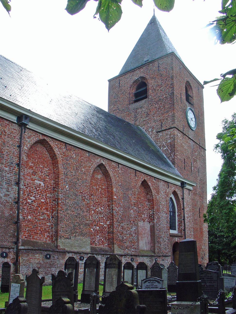 Mariakerk van Buitenpost